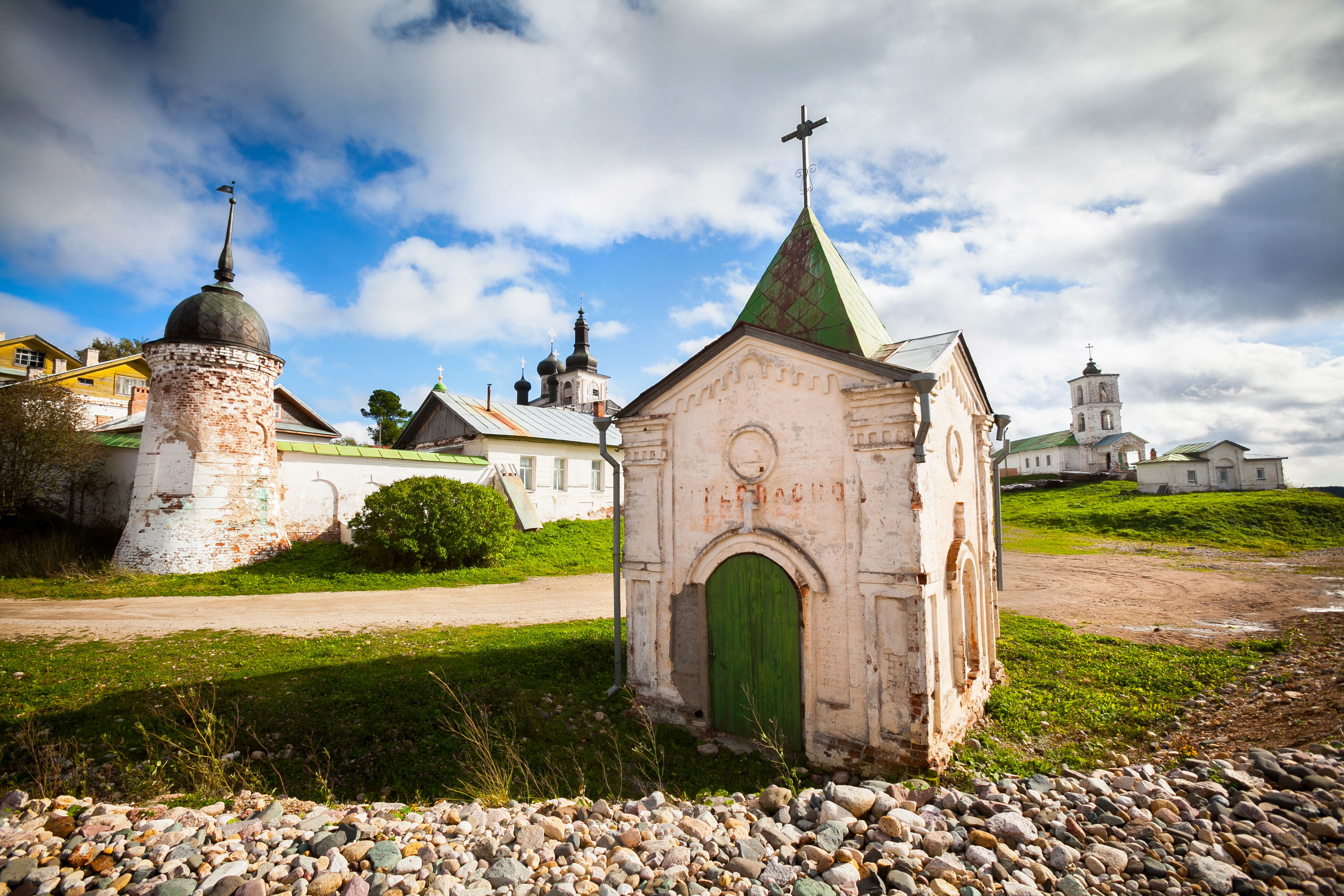 Часовня Иоанна Предтечи: Горицы, Кирилловский район, Вологодская область